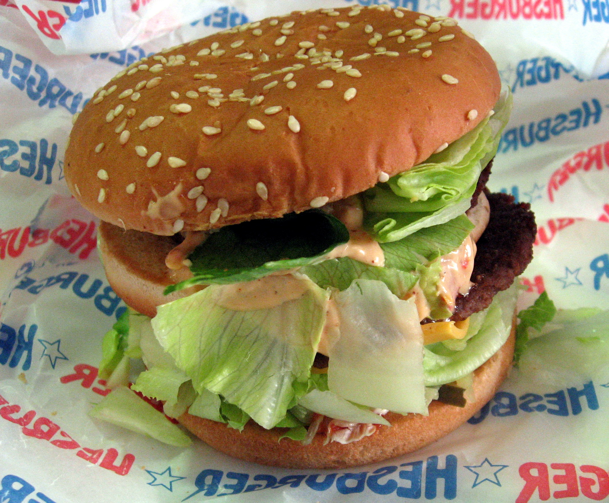 Hesburger hamburger